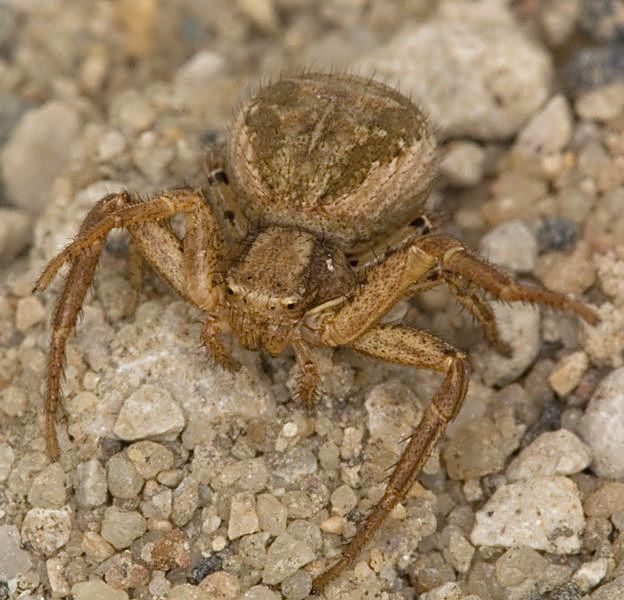 Xysticus kochi, adult female